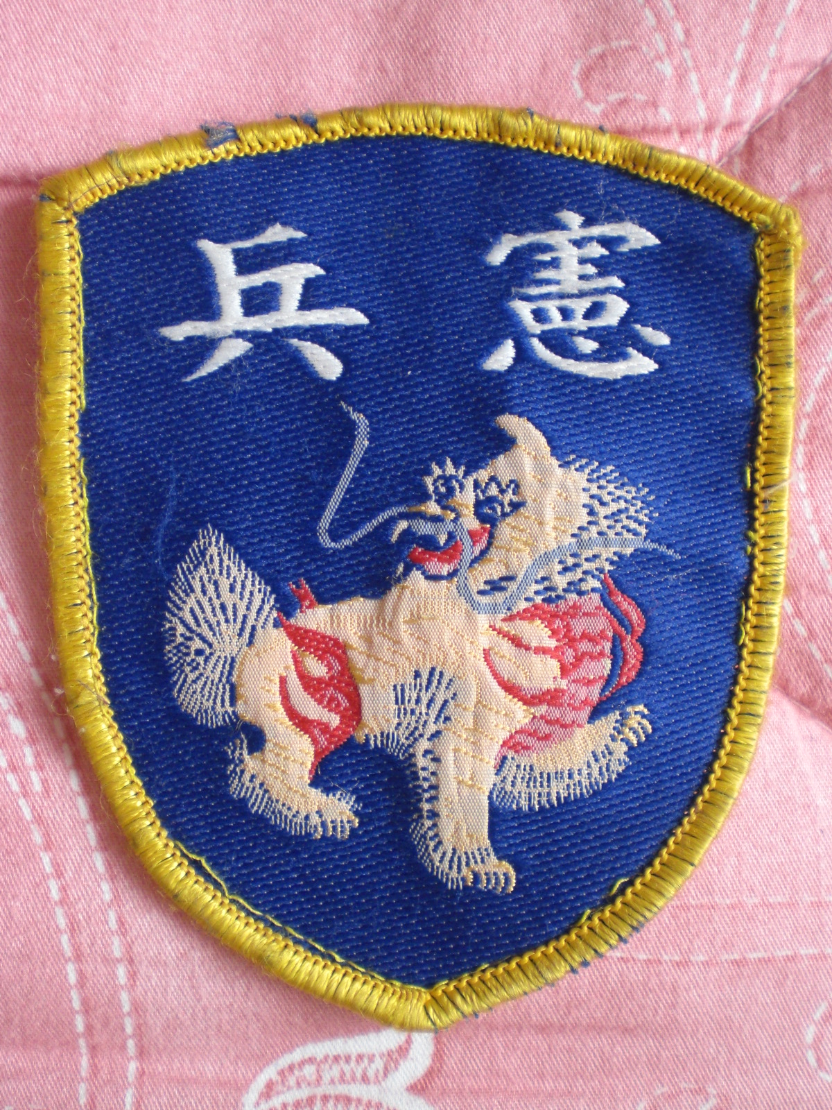 中文（台灣）: 中華民國憲兵臂章。